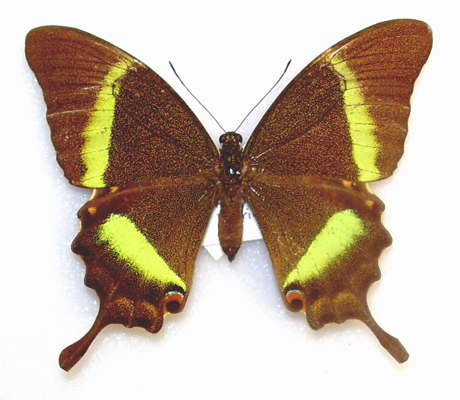 Papilio palinurus Malaya, Male upperside